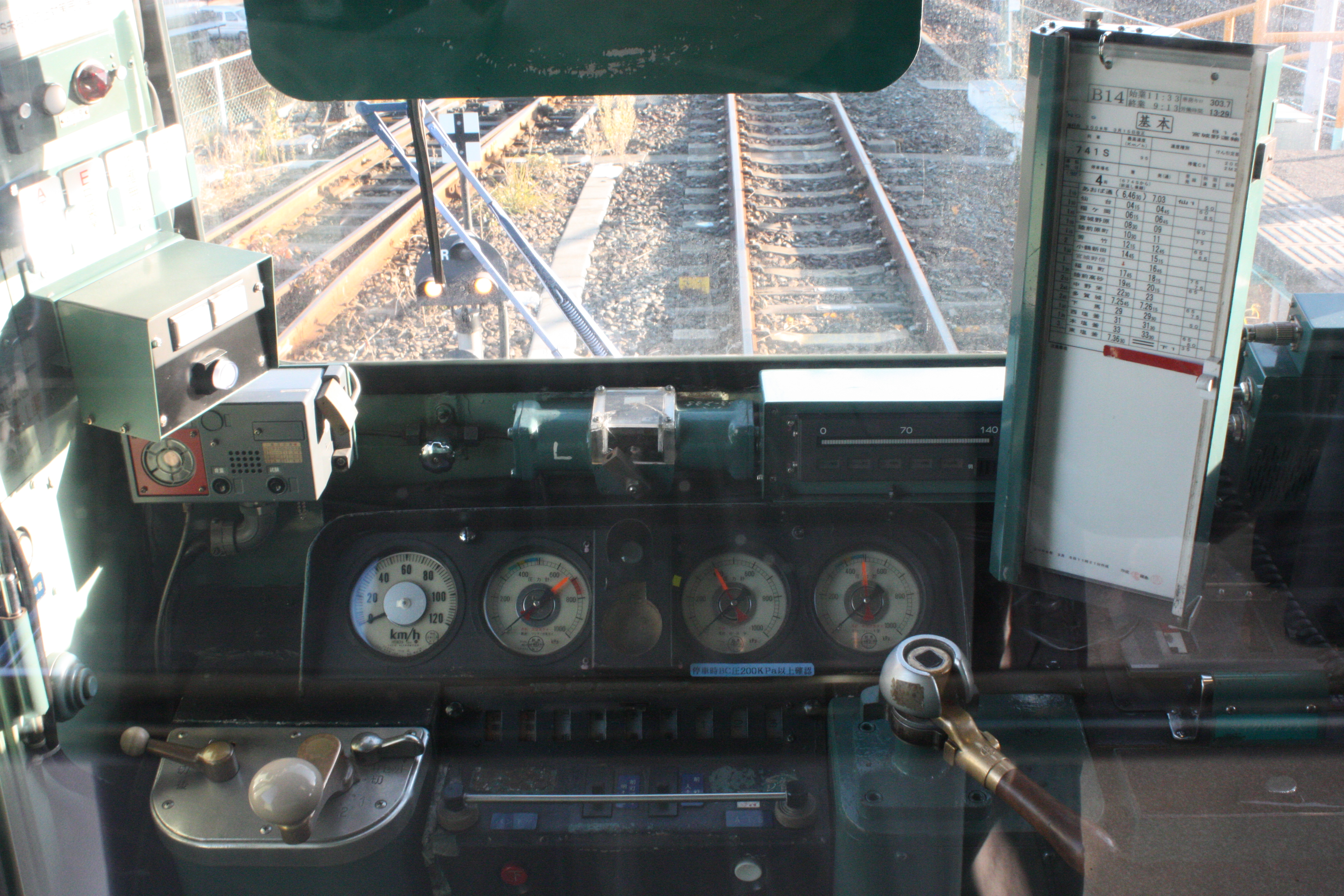 103系の運転台（JR西日本の車両）